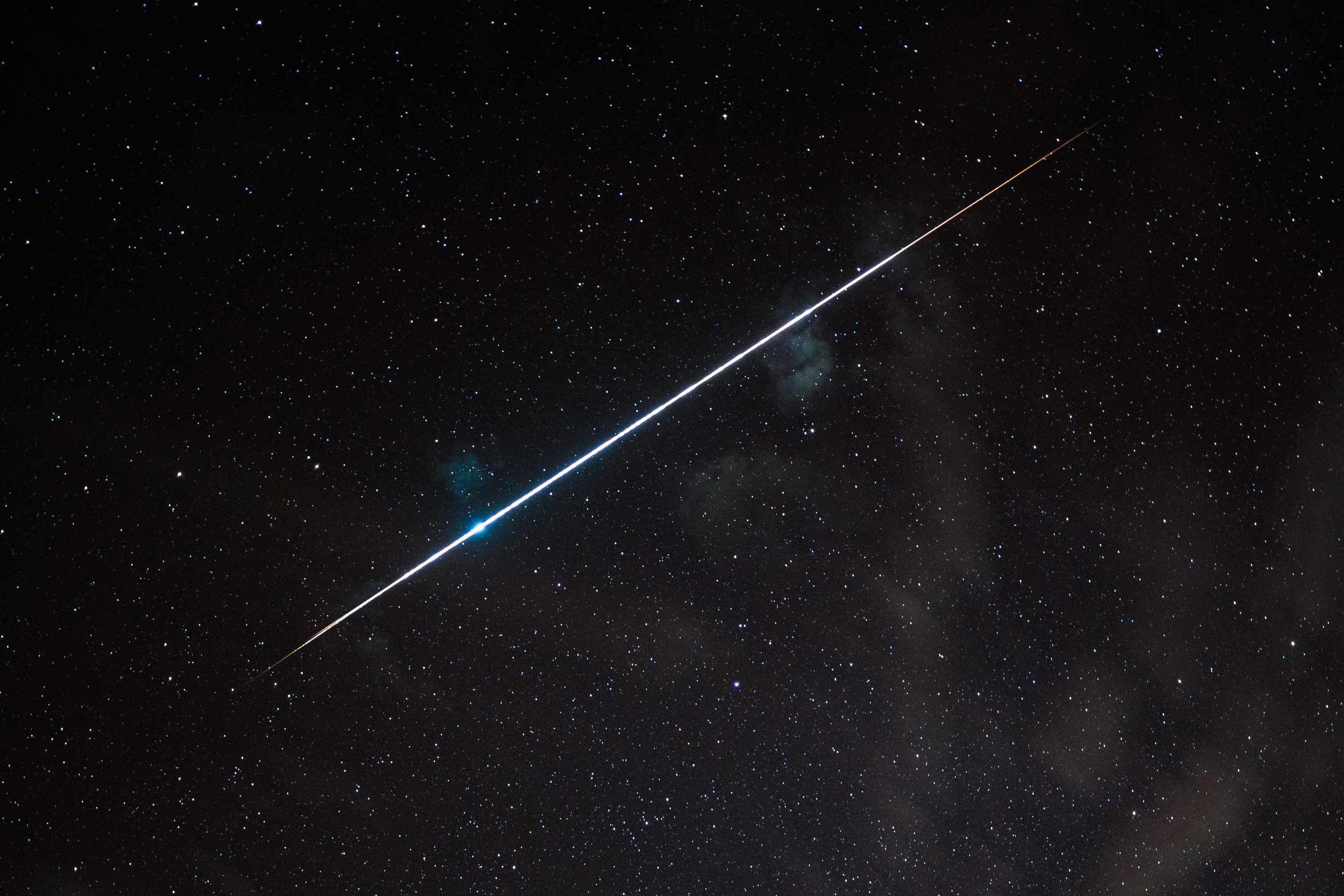 Meteor über Sardinien, 8.5.2016.